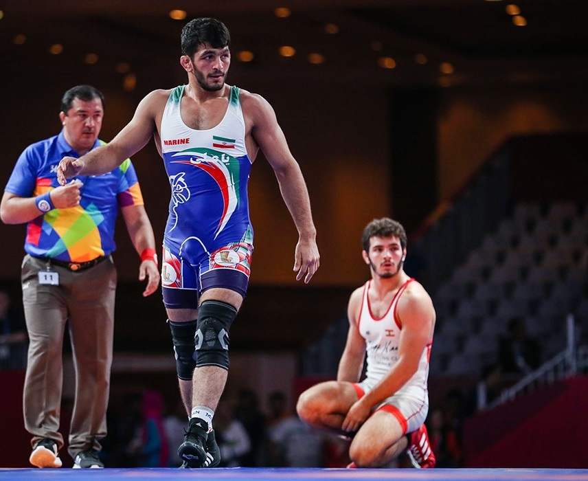 مازِرونی: حسن یزدانی جاکارتای فینال گادر